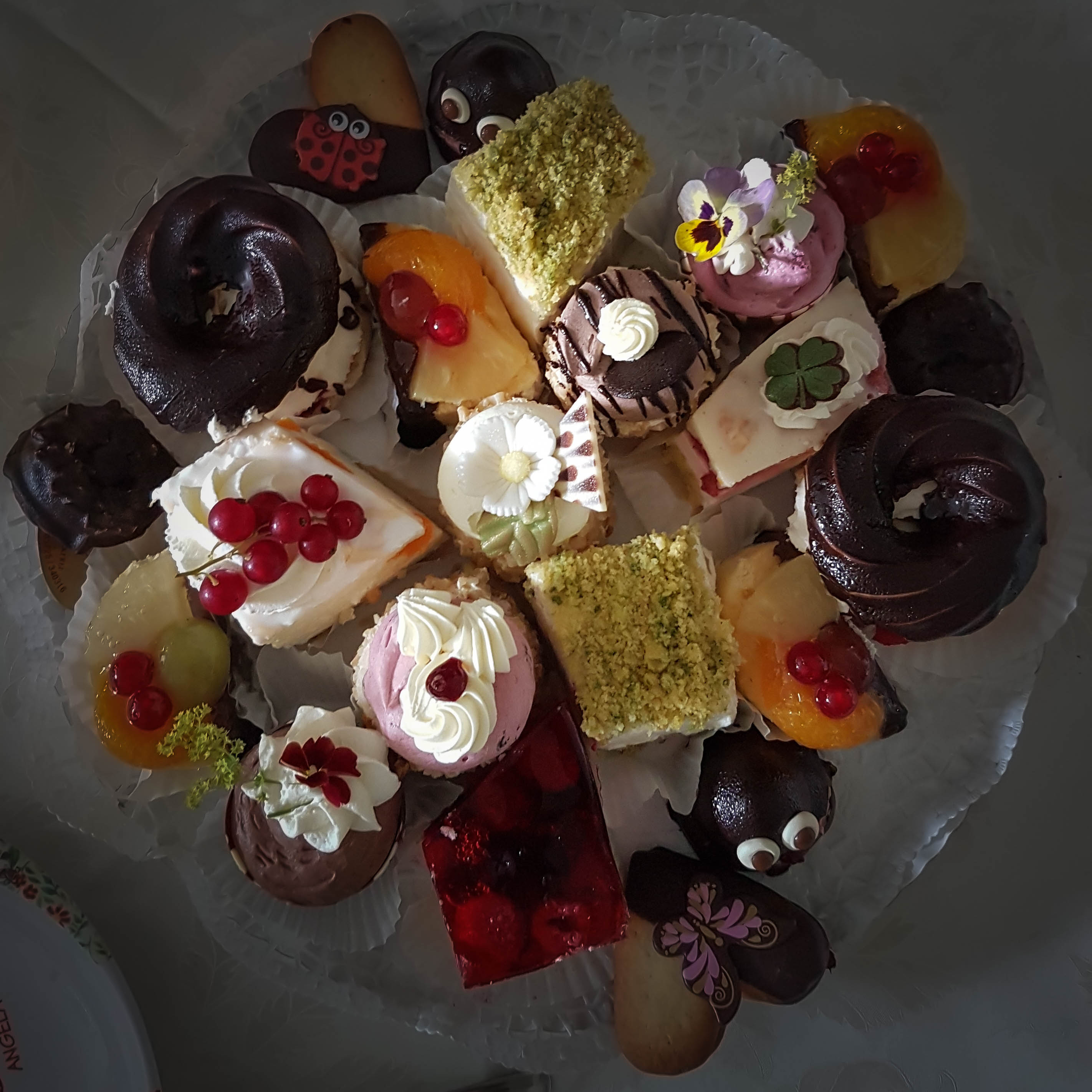 Bunter Teller